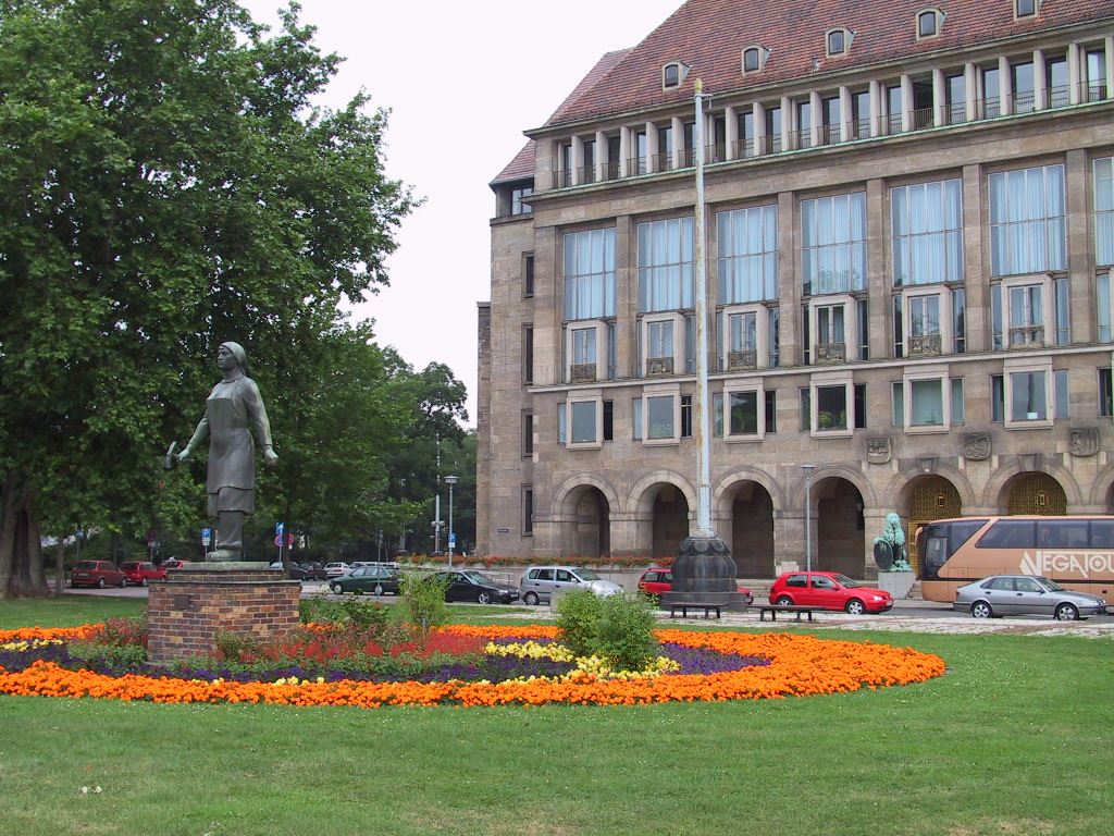 Trümmerfrau Dresden. Bildhauer: Walter Reinhold